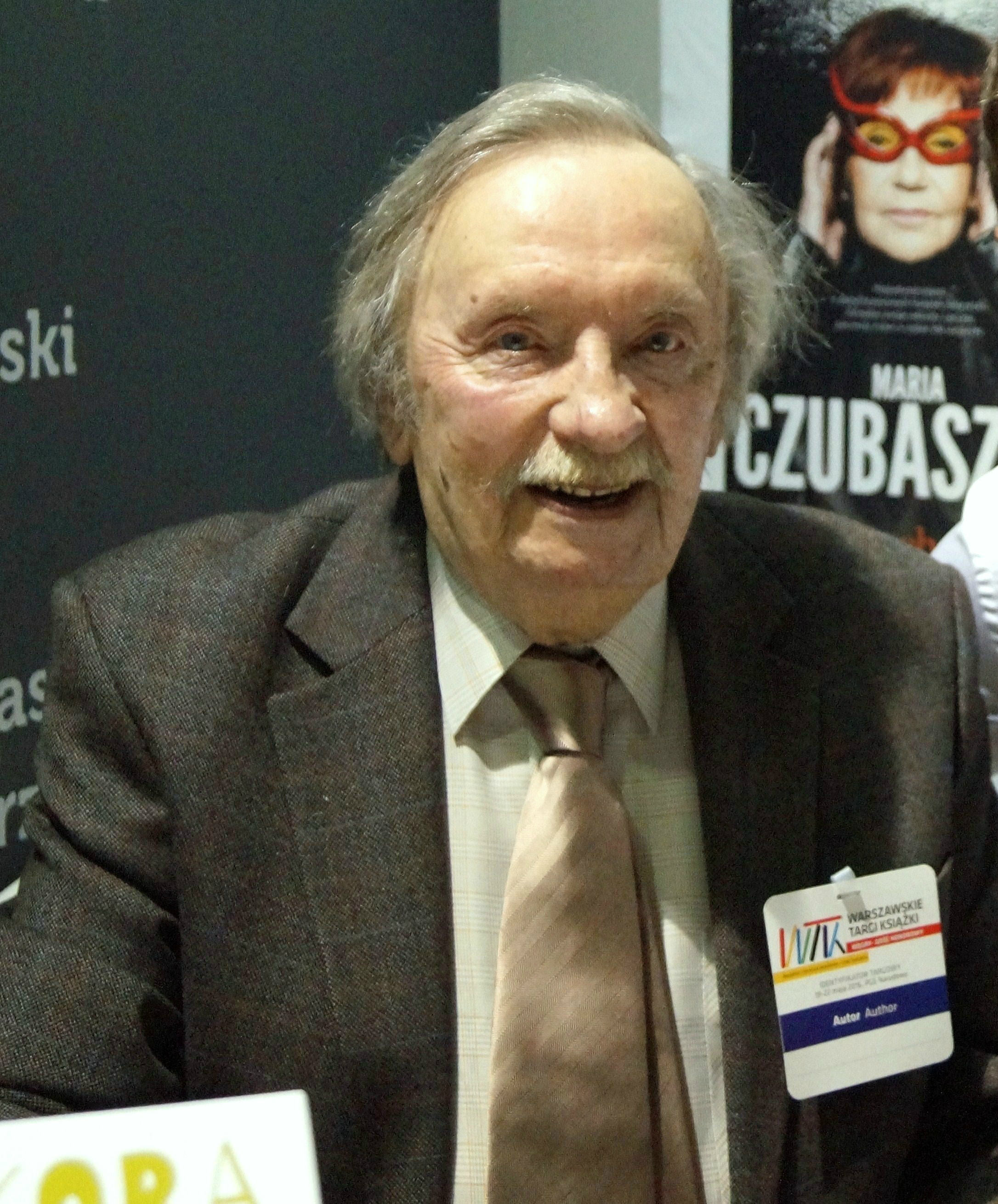 Wojciech Pokora (aktor) na Warszawskich Targach Książki 2016.